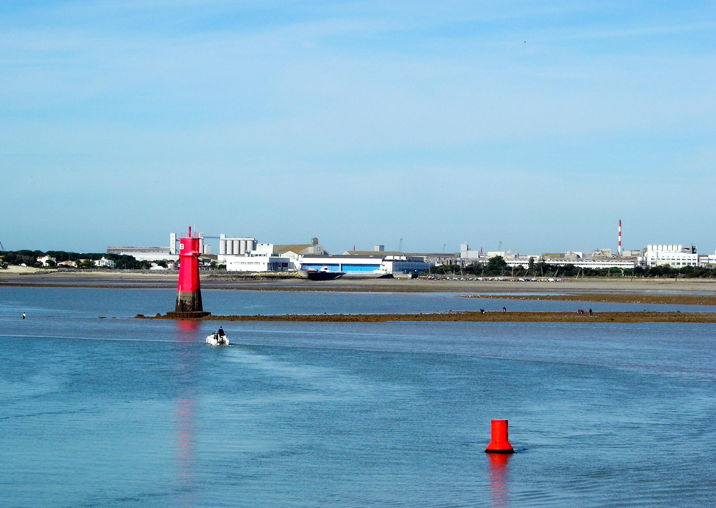 Phare Richelieu à la Rochelle